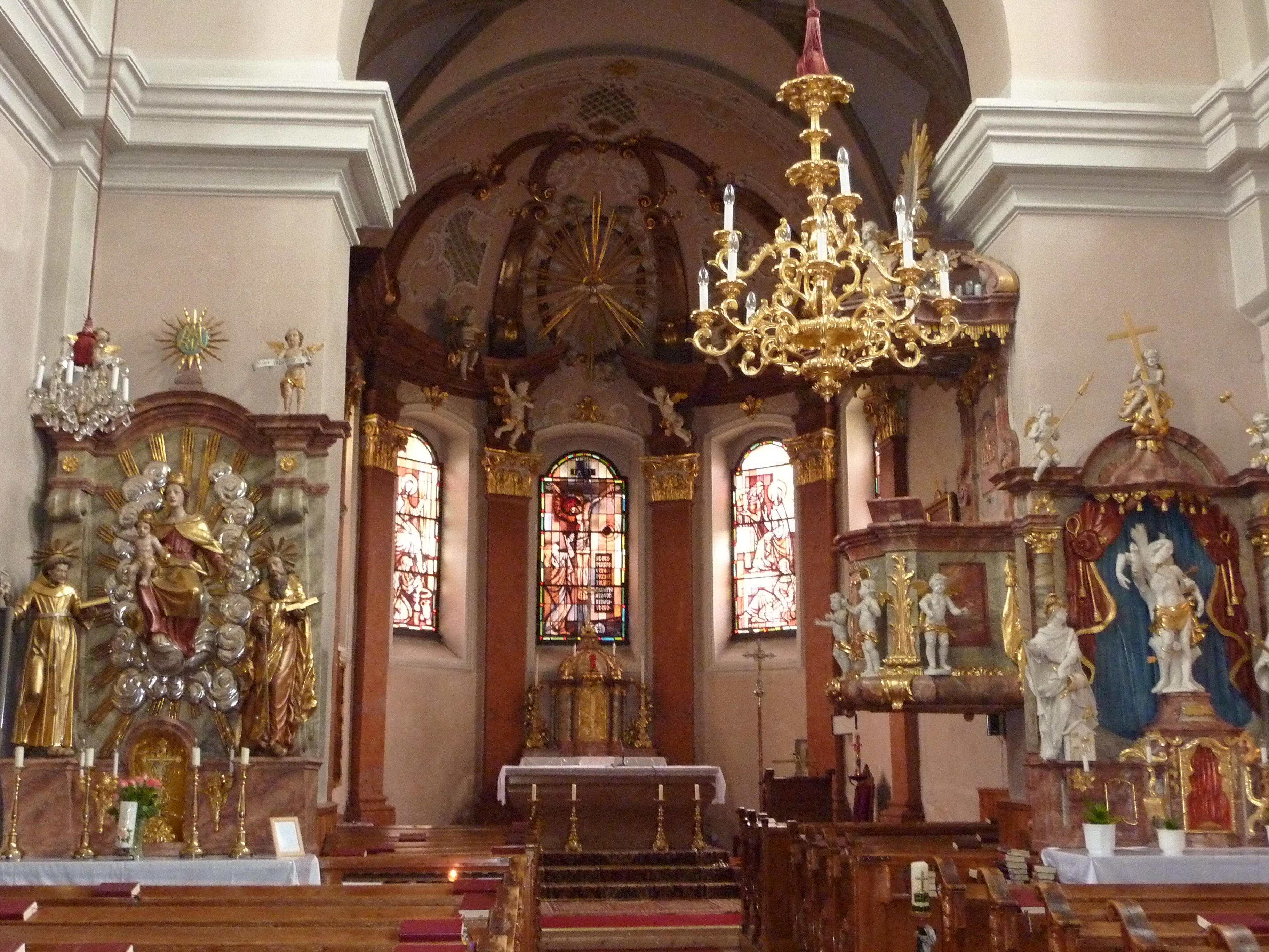 Pfarrkirche, Altenmarkt, Yspertal, Niederösterreich